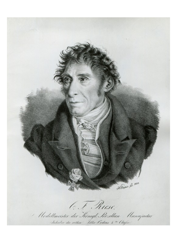 Porträt Karl Friedrich Riese (1759–1834), Lithographie von Papin 1830